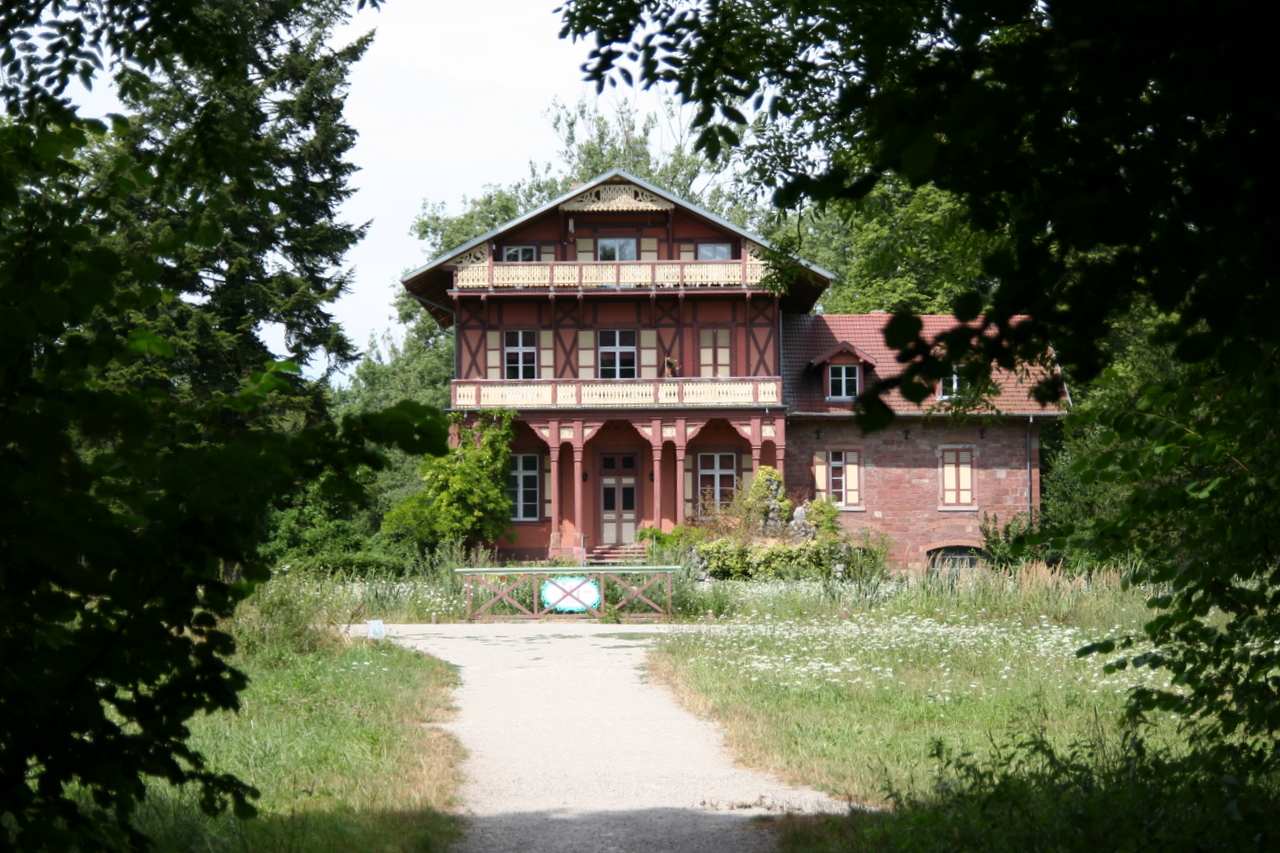 Bâtiment principal de la pisciculture impériale de la petite Camargue alsacienne, près de Saint-Louis, Alsace, France